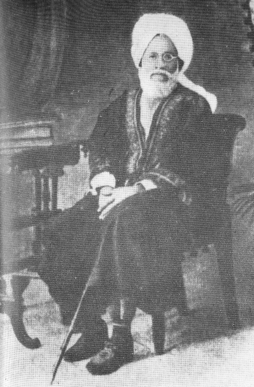 Mualana Shibli Noamani (1857 - 1914)